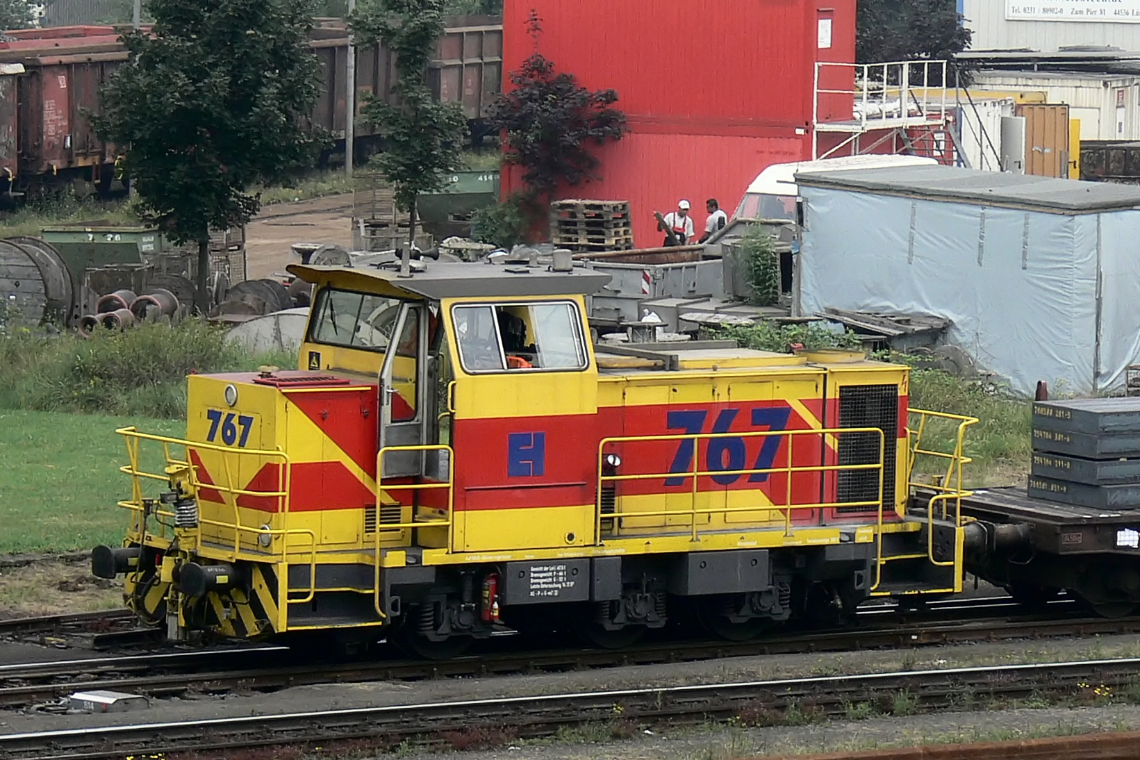 Mak DE 501 als Eisenbahn und Häfen 767 im Hüttenwerk Krupp-Mannesmann in Duisburg-Hüttenheim